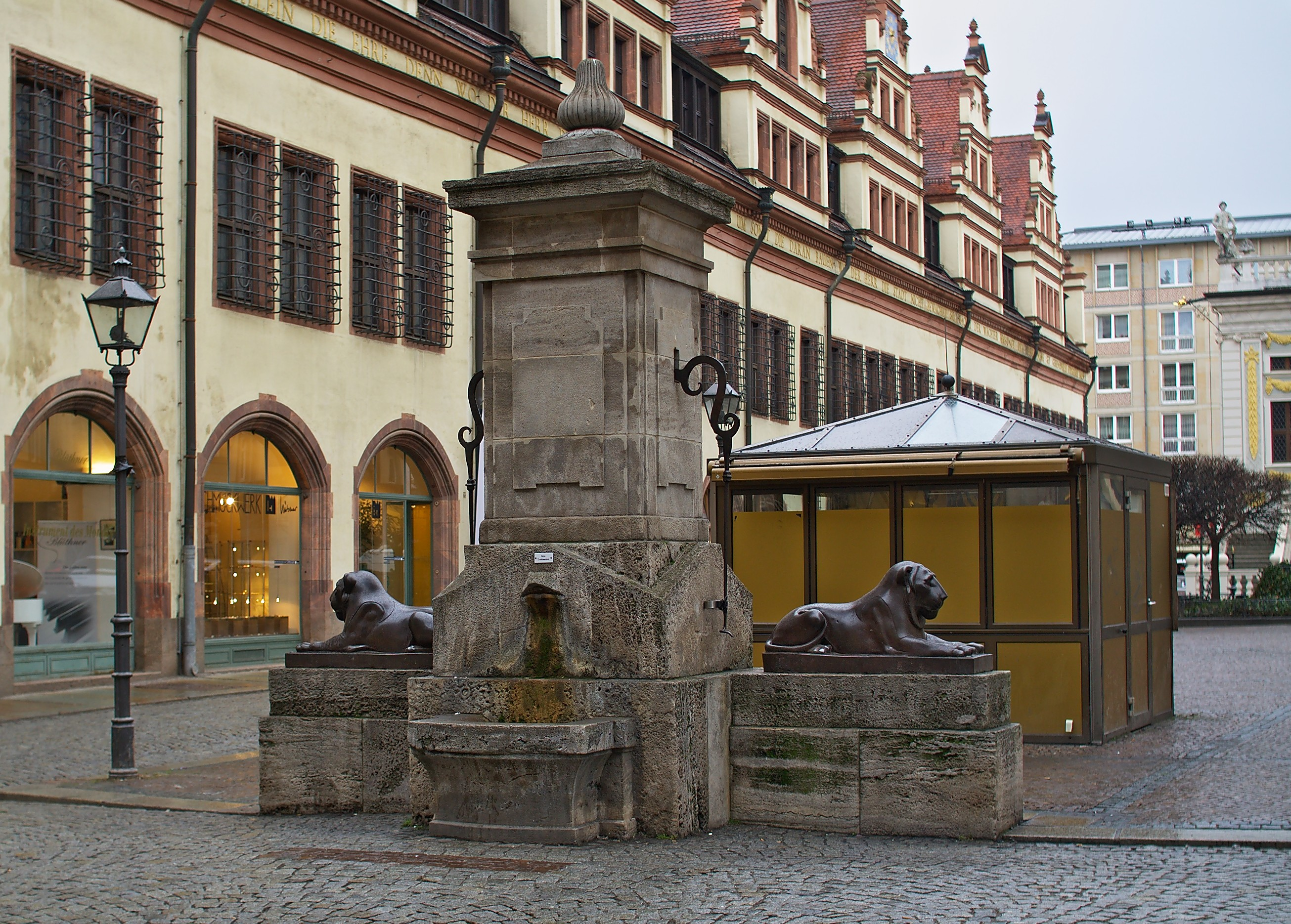 Der Löwenbrunnen auf dem Naschmarkt, Leipzig 2011.